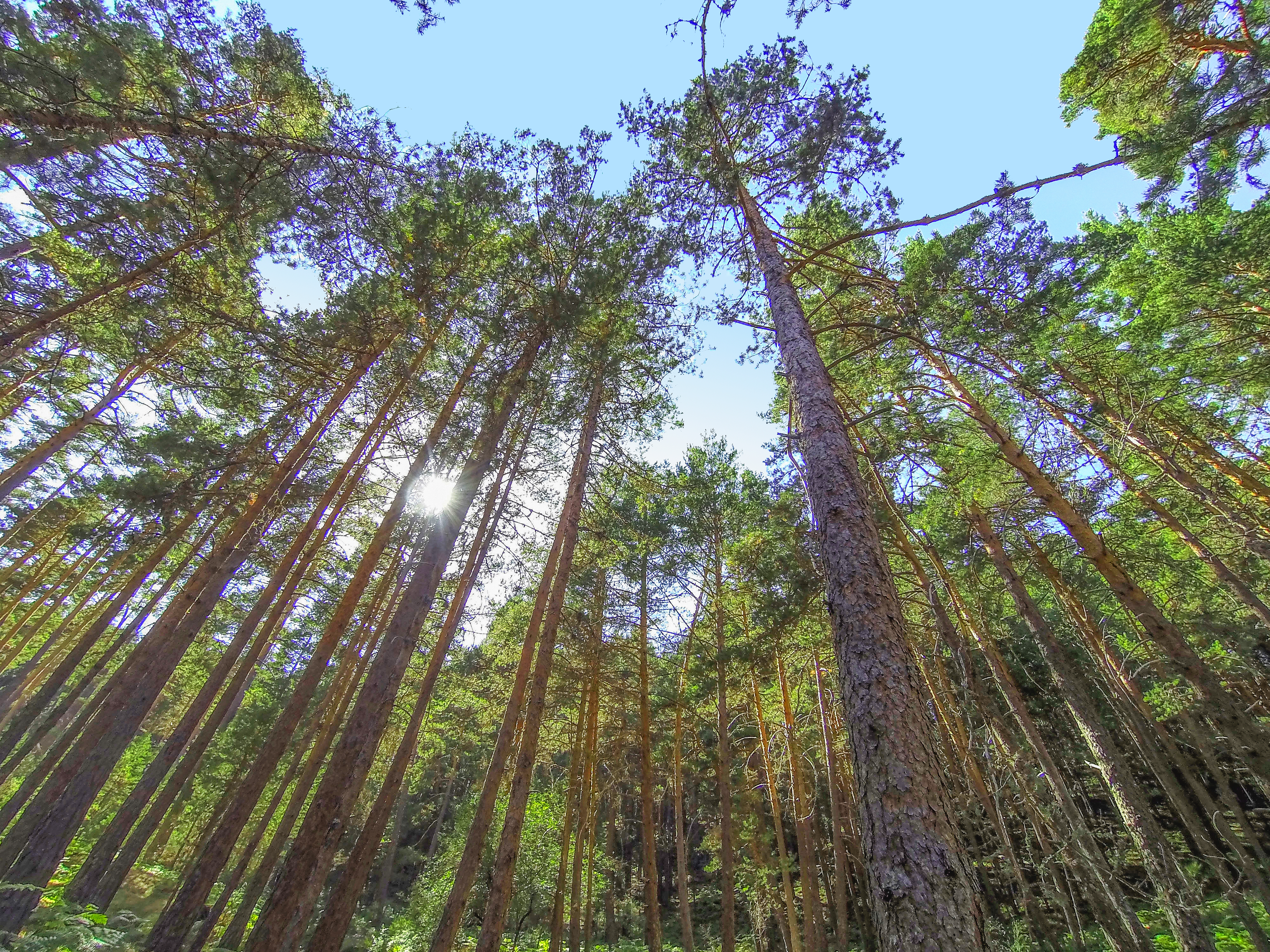 Valsaín. Sierra de Guadarrama This is a photography of a Special Area of Conservation in Spain with the ID: ES4160109. Natura2000 entry, EEA entry